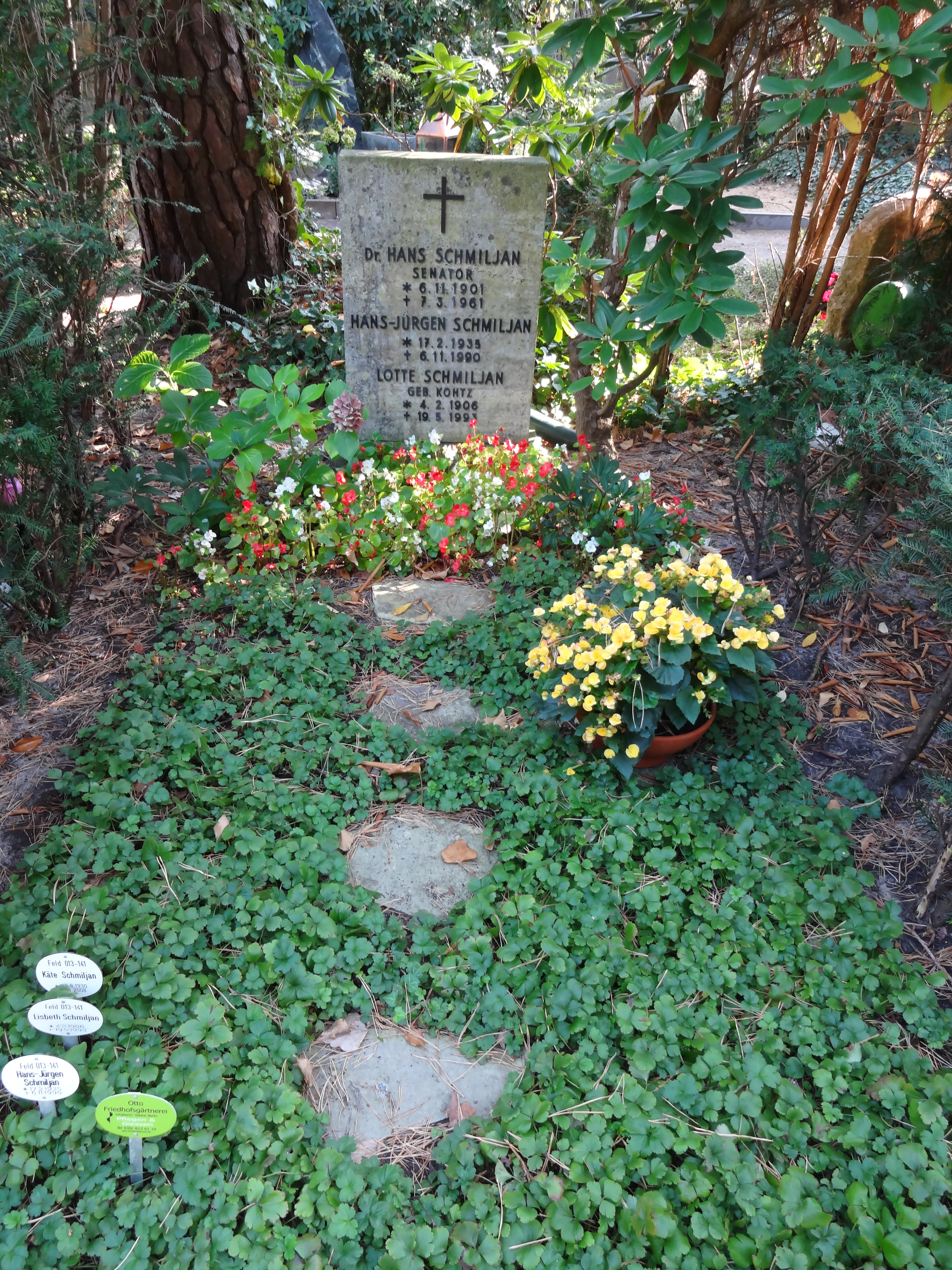 ehemaliges Ehrengrab von Hans Schmiljan auf dem Waldfriedhof Dahlem, der Friedhof ist als Gartendenkmal der Stadt Berlin (Nr. 09045949)This is a photograph of an architectural monument.